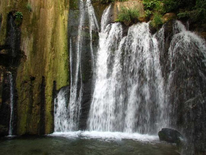 آبشار وارک